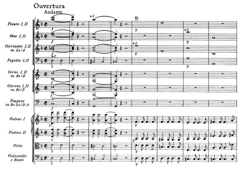 Ouverture (1e page) du Don Giovanni de Mozart